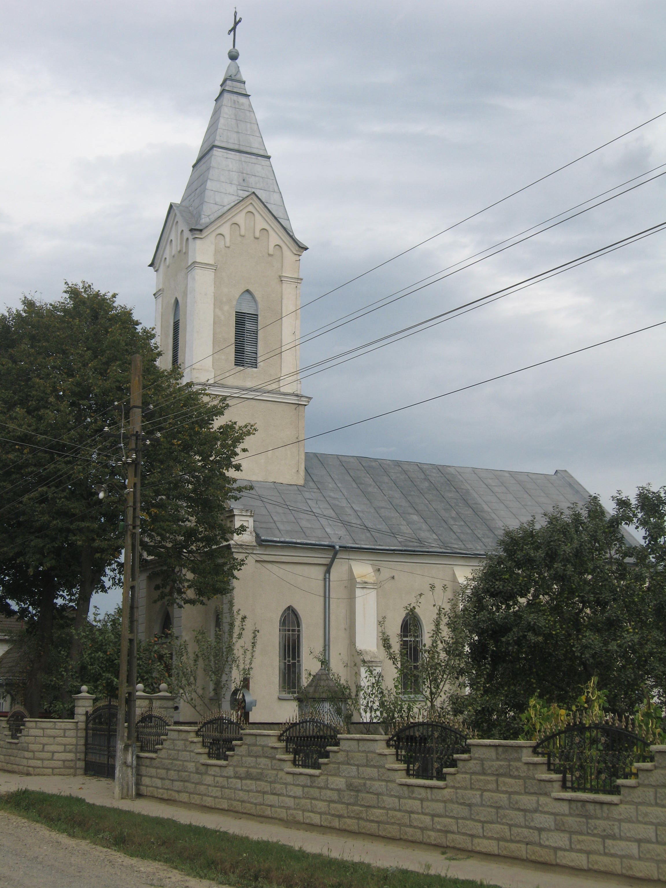 Biserica Sf. Mihail și Gavriil din Măneuți, Suceava County, Romania